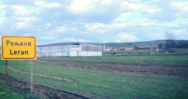 fshati Leran